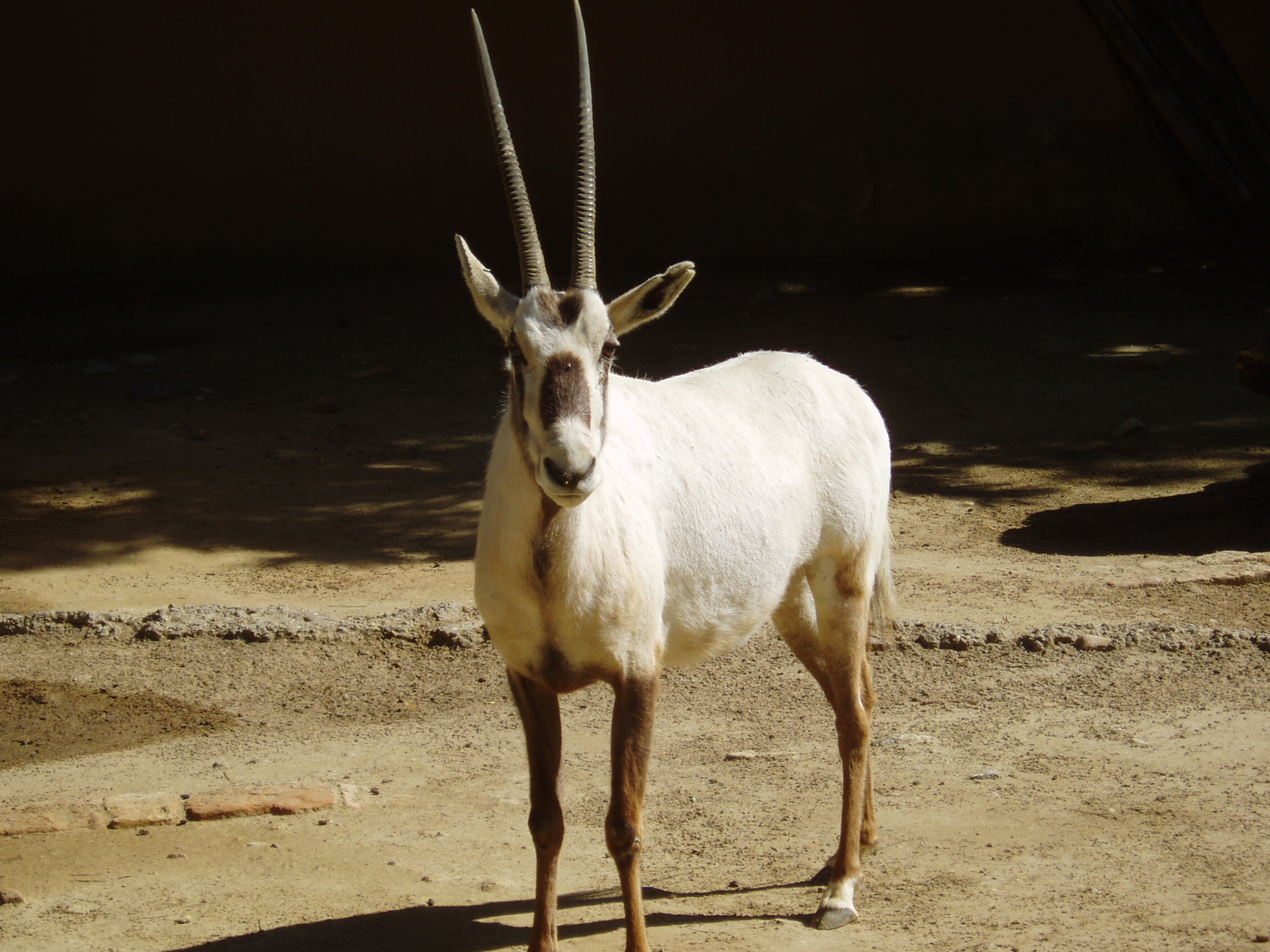 Oryx de Arabia en el zoo de Jerez de la Frontera, España.